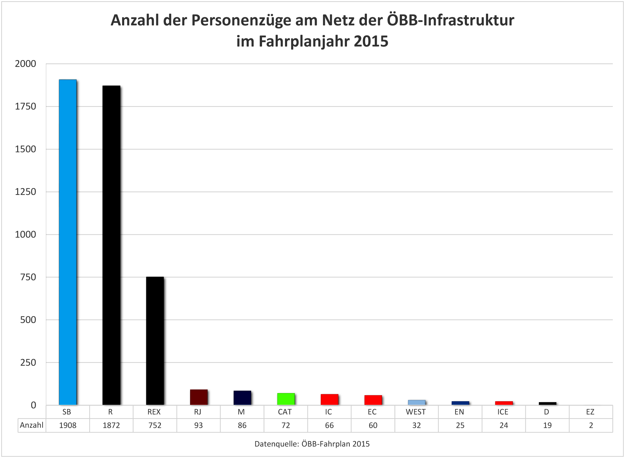 Anzahl der Personenzüge, je Zugkategorie, am Netz der ÖBB-Infrastruktur im Fahrplanjahr 2015. Datenquelle: ÖBB-Fahrplan 2015